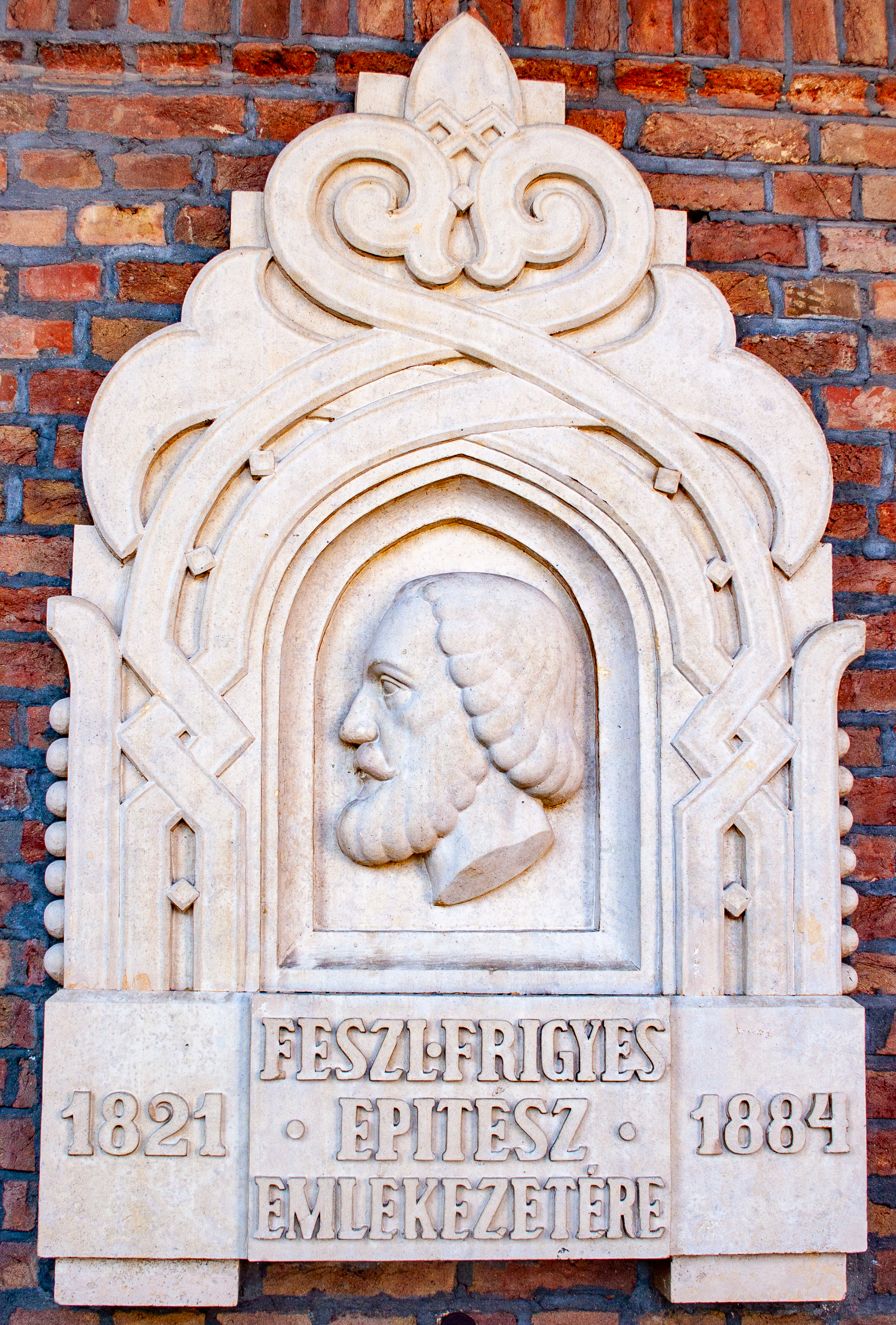 Feszl Frigyes építész (Ohmann Béla szobra) photo by uploader